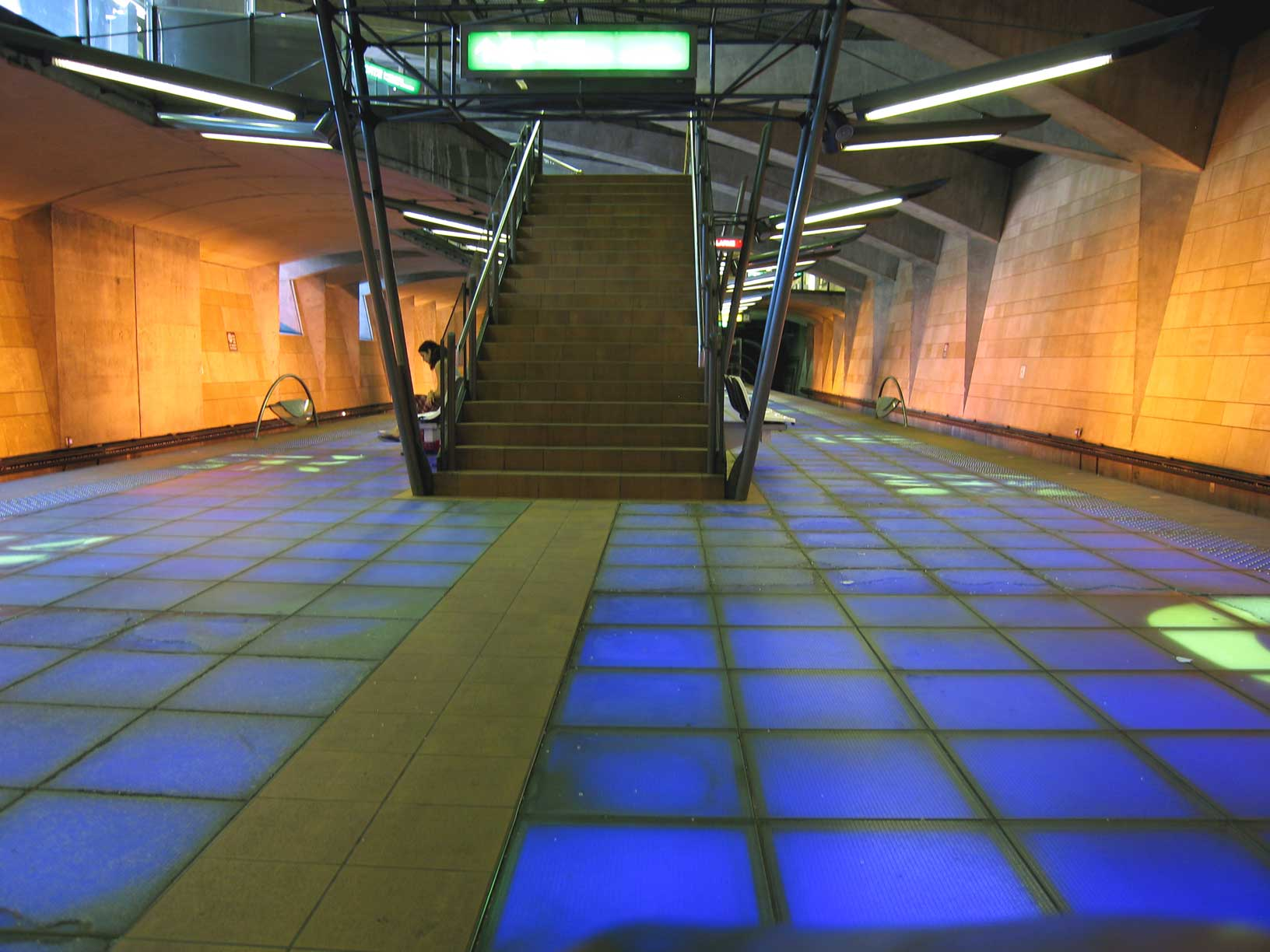 Station Valmy ligne D, Lyon, France